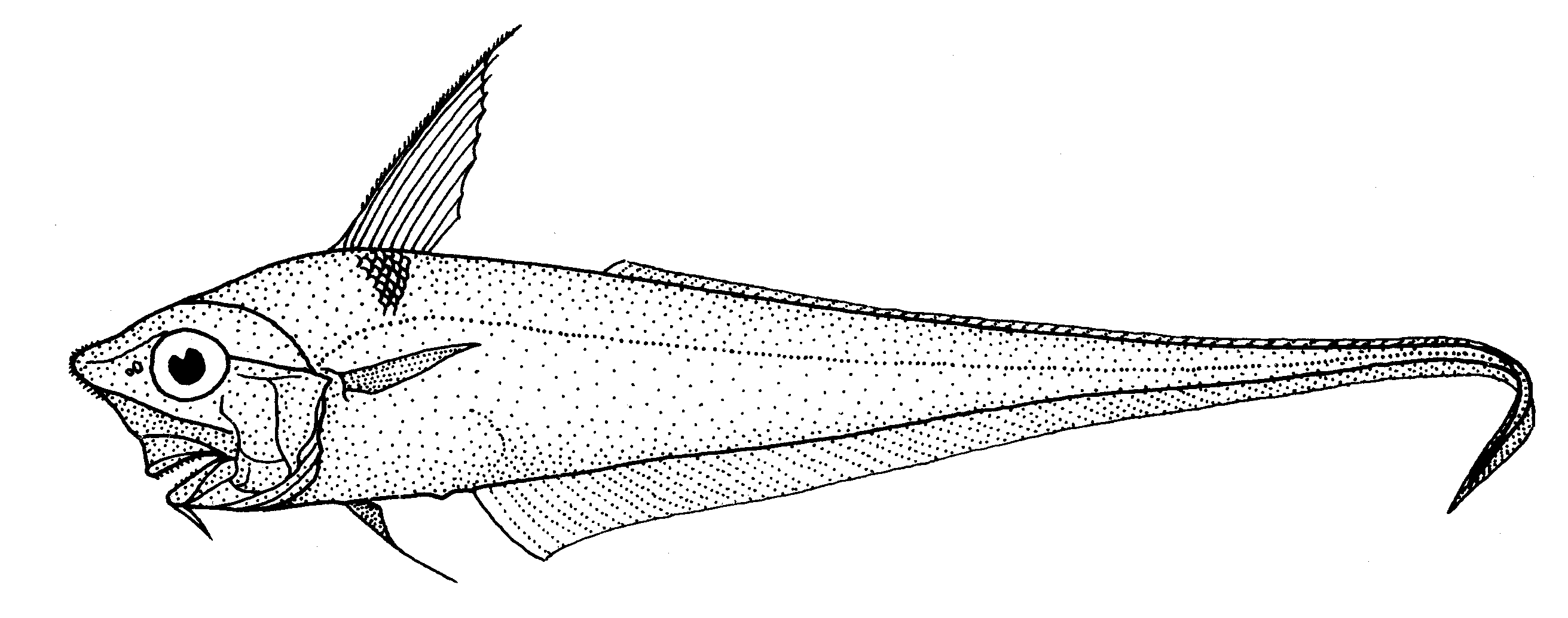 Nezumia namatahi (Squashed face rattail)